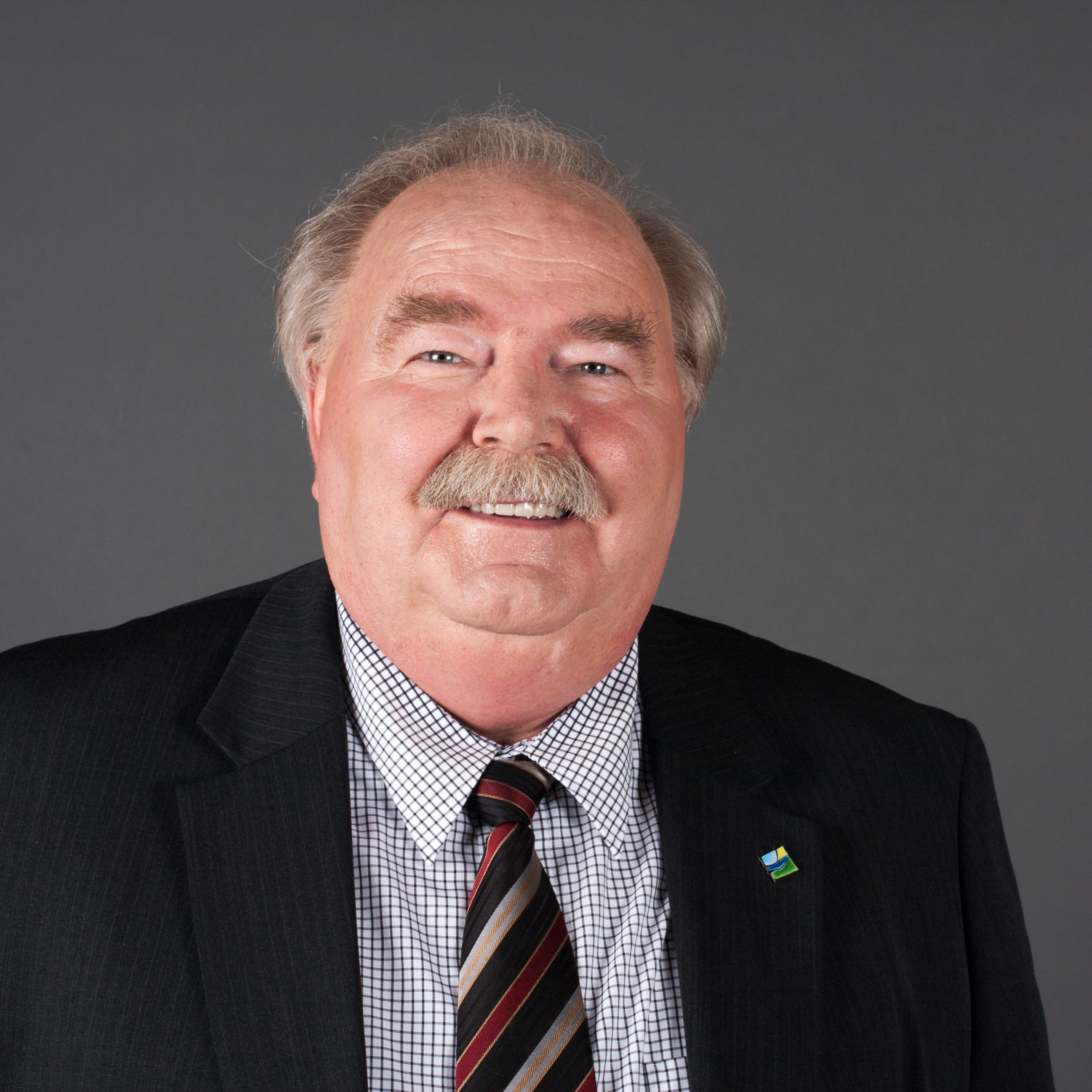 Heino Schütt, MdL Mecklenburg-Vorpommern, CDU Fraktion